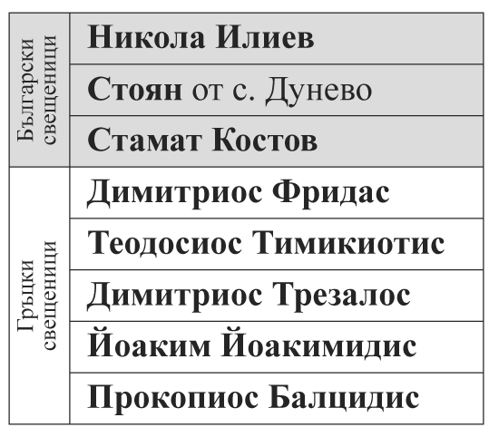 Свещениците на село Дерекьой (Гюмюрджинско)